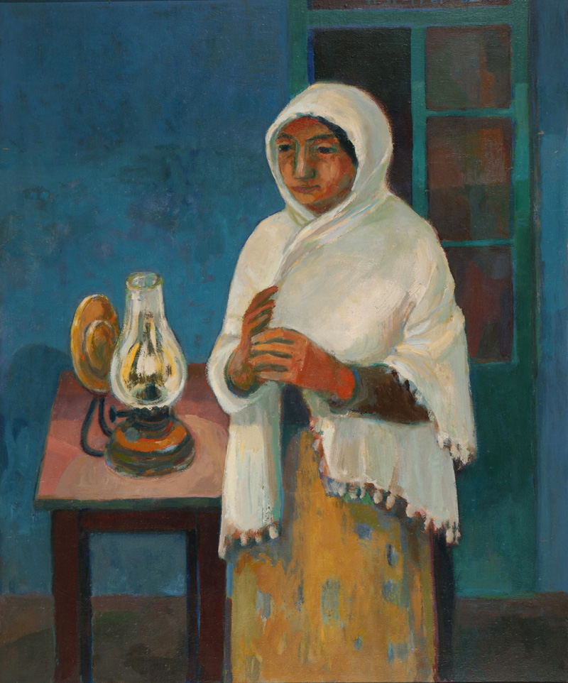 Evangelia. Oelgemaelde von Heidy Stangenberg-Merck